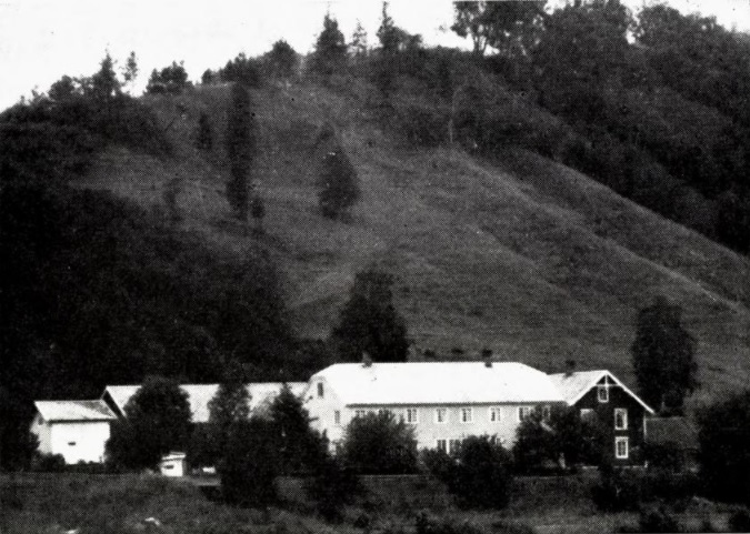 Bjertem, gnr. 83/3 i Hegra kommune, nå gnr. 287/3 i Stjørdal kommune.